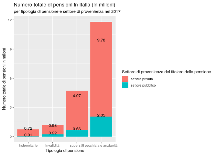 File realizzato con RStudio usando dati Istat